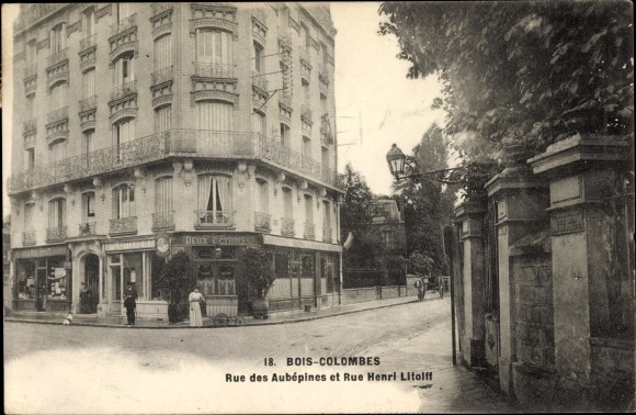 La rue des Aubépines et la rue Henri-Litolff à Bois-Colombes